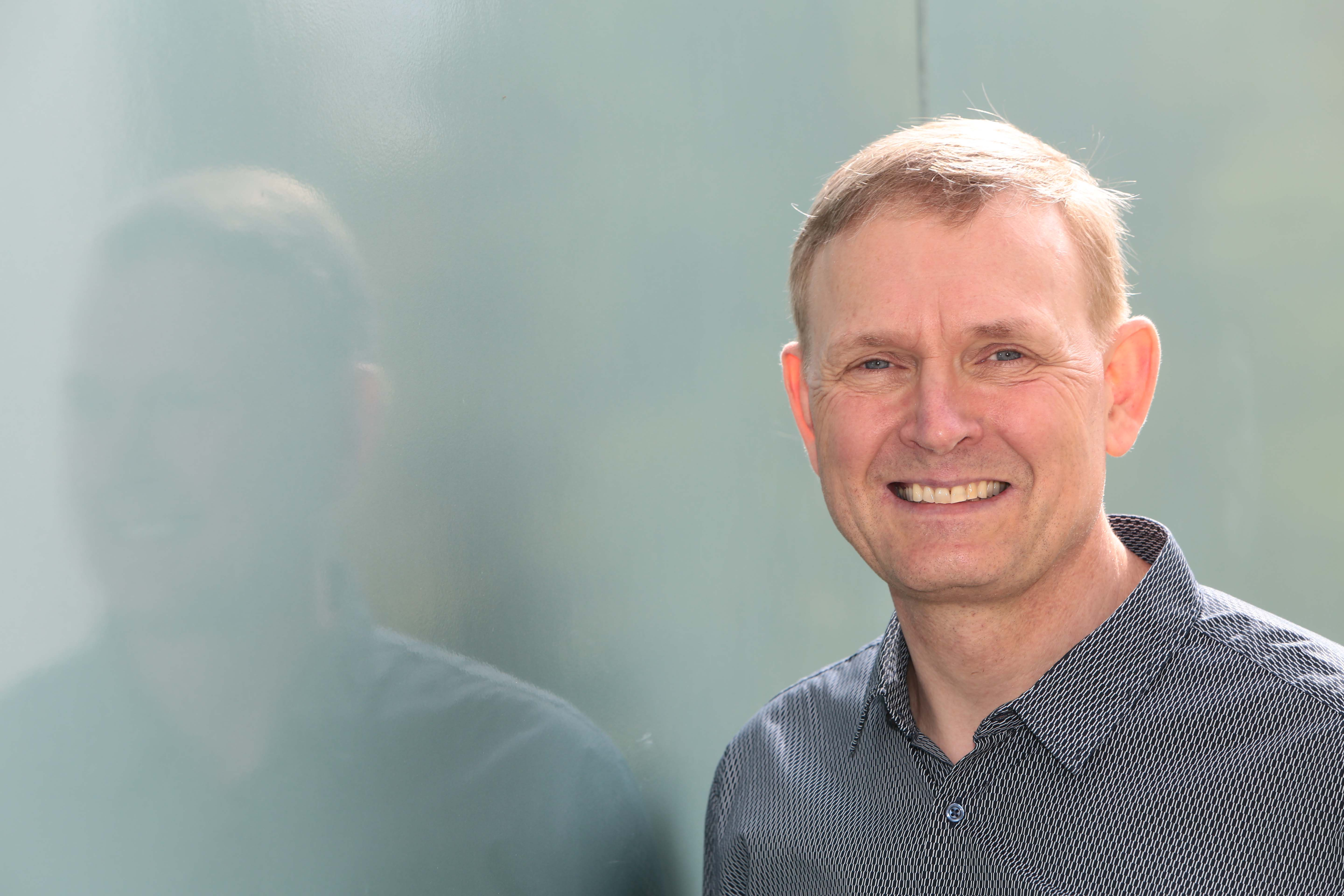 Herr Oliver Gritz